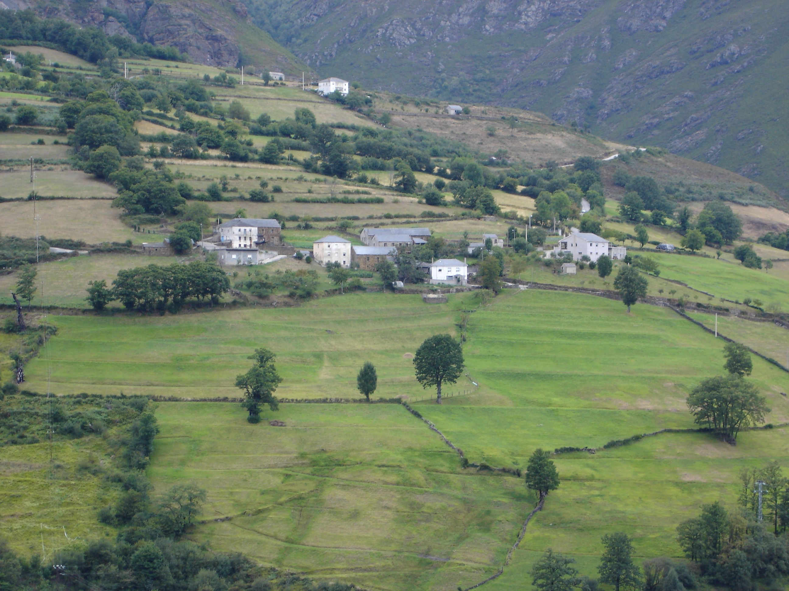 Panoramica del pueblo de Villares de abajo